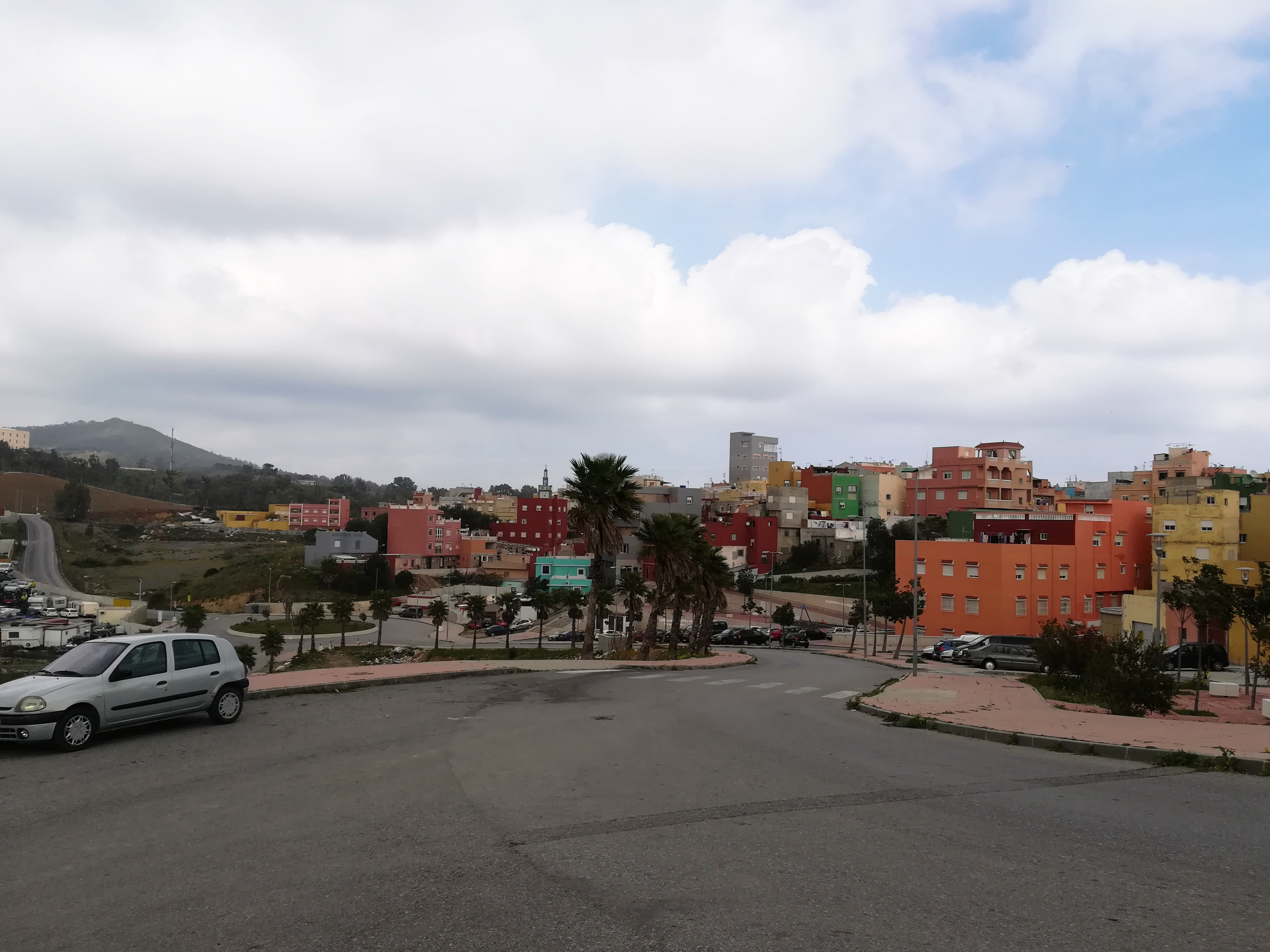 El Príncipe. Ceuta. España.